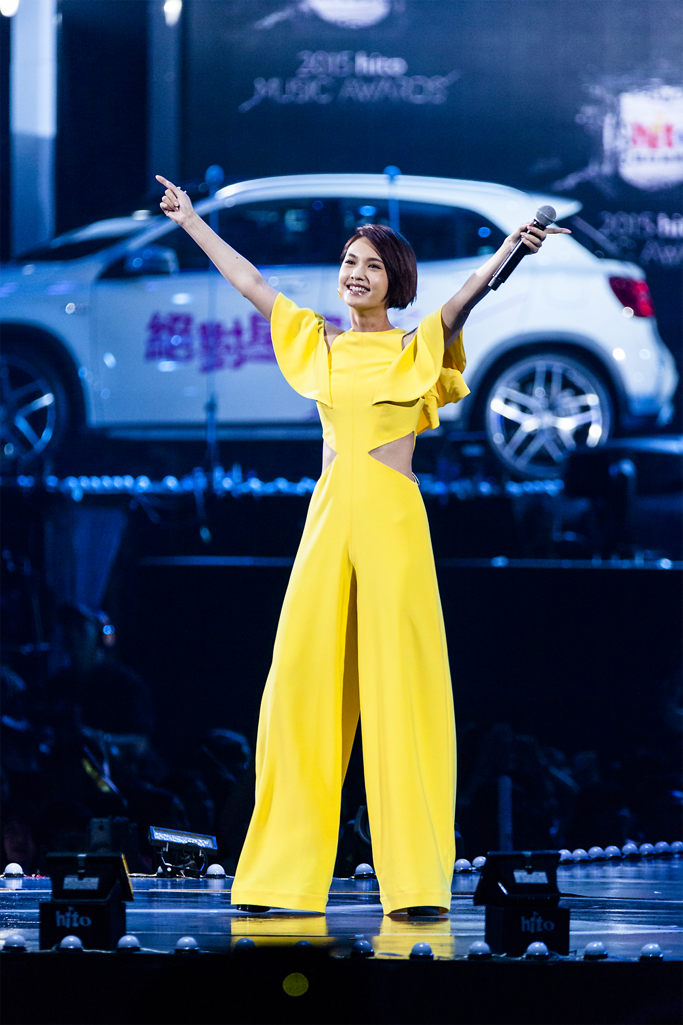 楊丞琳出席2015年hito流行音樂獎頒獎典禮。